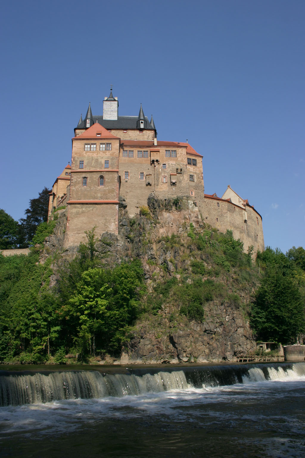 Burg Kriebstein über der Zschopau in Kriebstein, Sachsen, Deutschland.